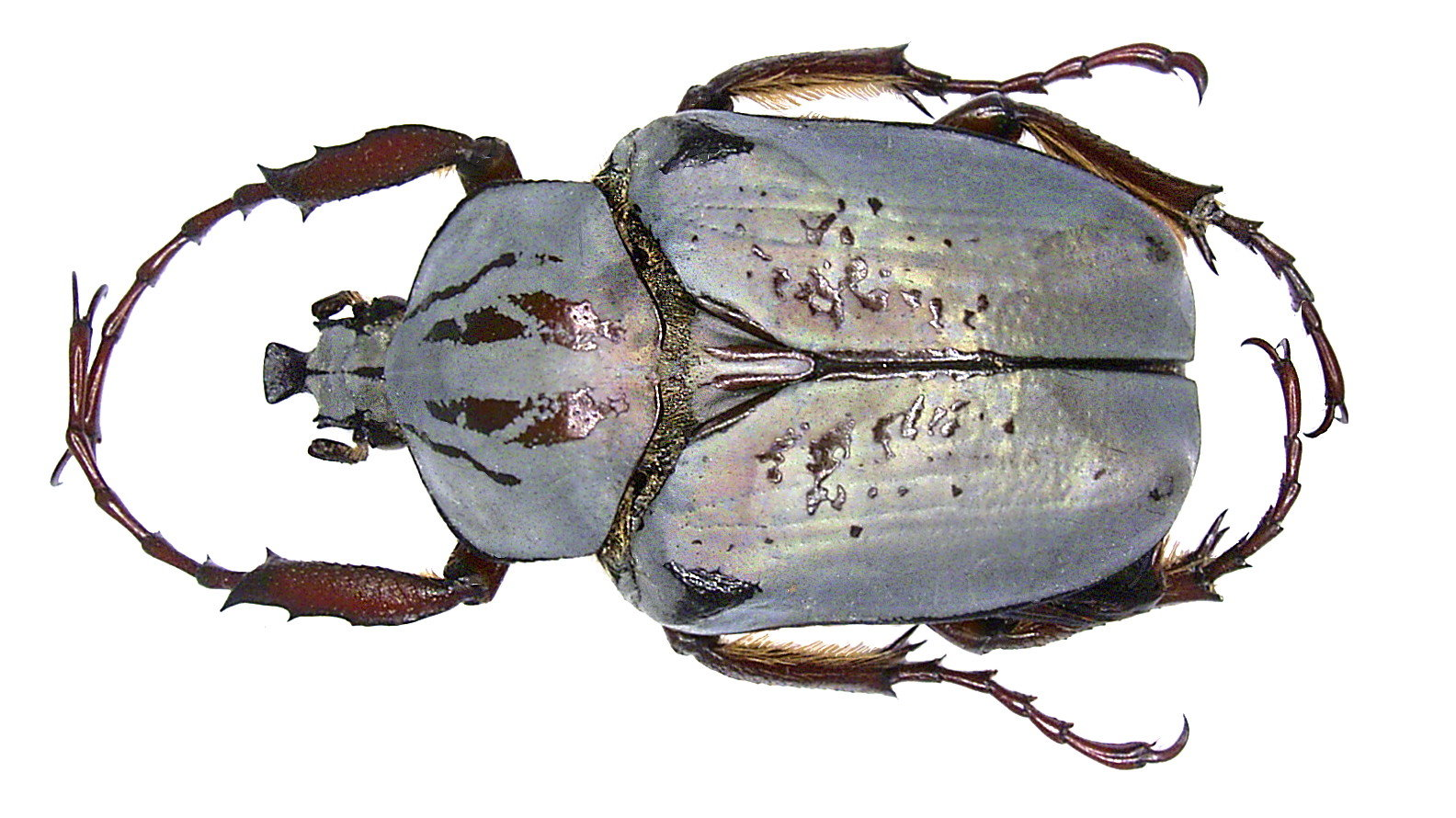 Familie: Scarabaeidae Grösse: 37 mm Fundort: Tanzania, Usambara Forest leg.2001; det. U.Schmidt Foto: U.Schmidt, 2006